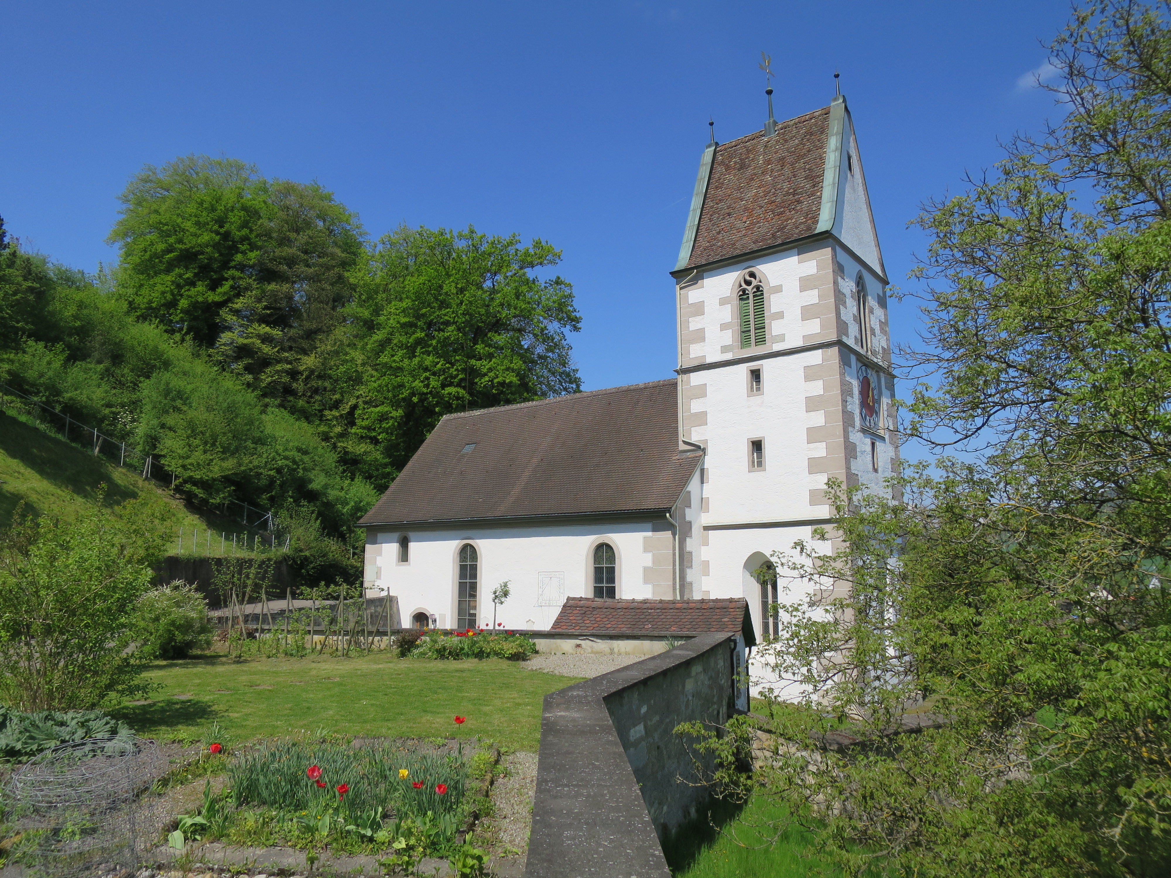 Ansicht der reformierten Kirche Rorbas